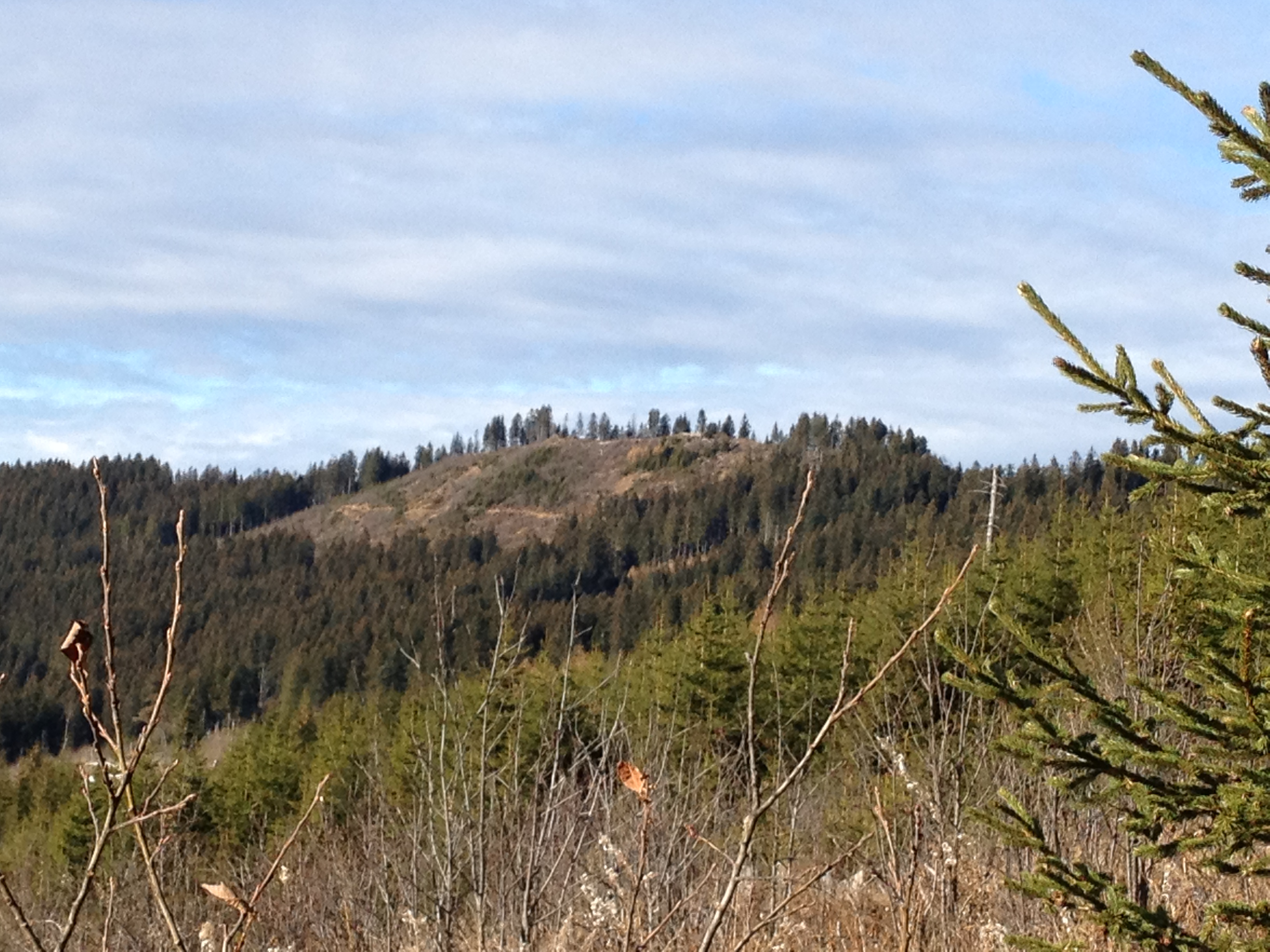 Blick auf die Pfyffe von Südosten